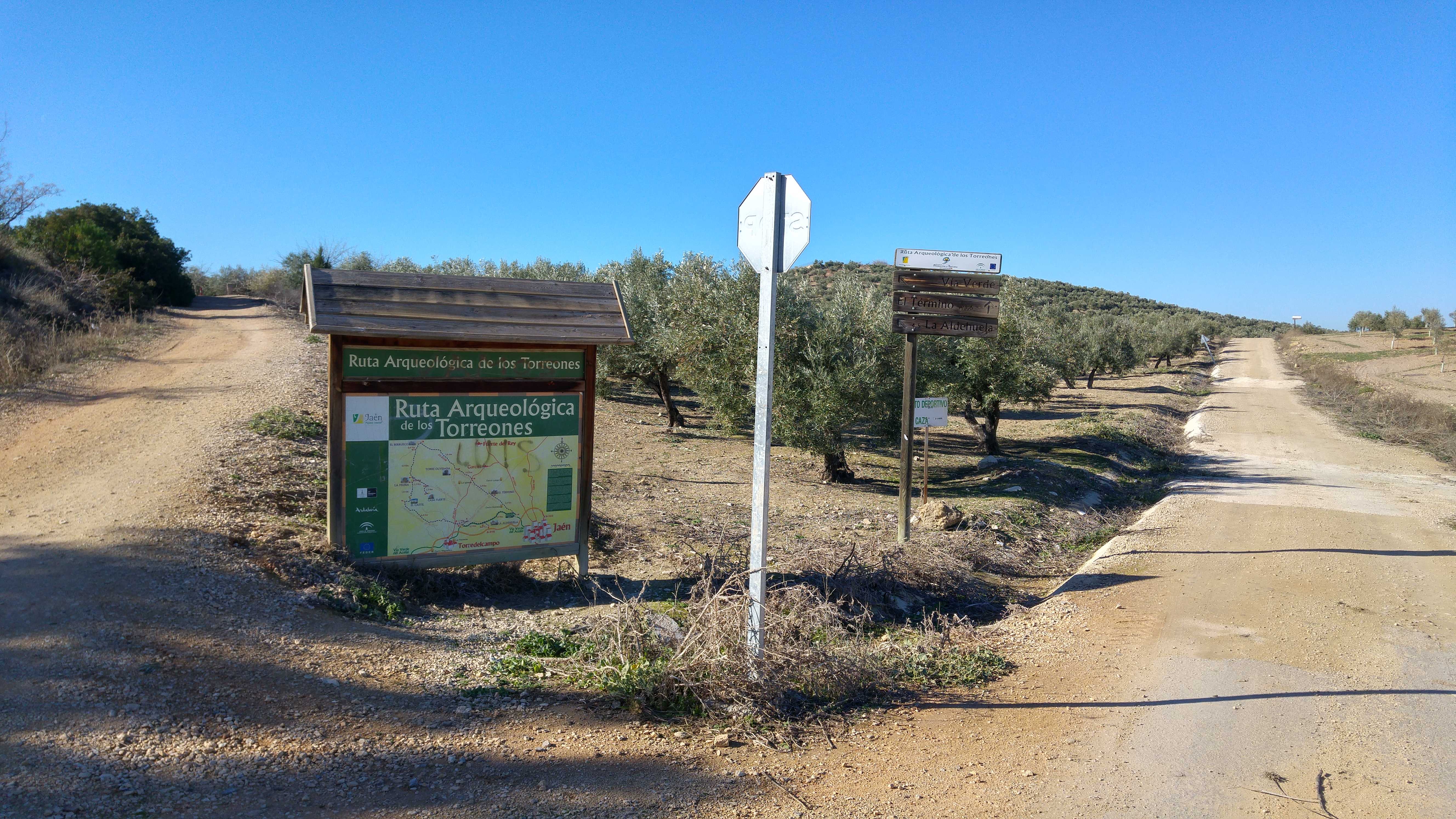 Panel indicativo de la ruta arqueológica de los Torreones, en la Vía Verde del Aceite, kilómetro 3, Jaén.